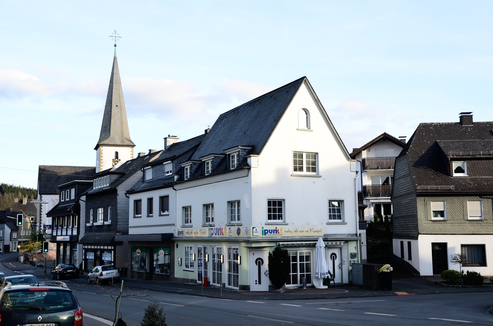 Gebäude in Freienohl, Meschede im Hochsauerlandkreis, Nordrhein-Westfalen